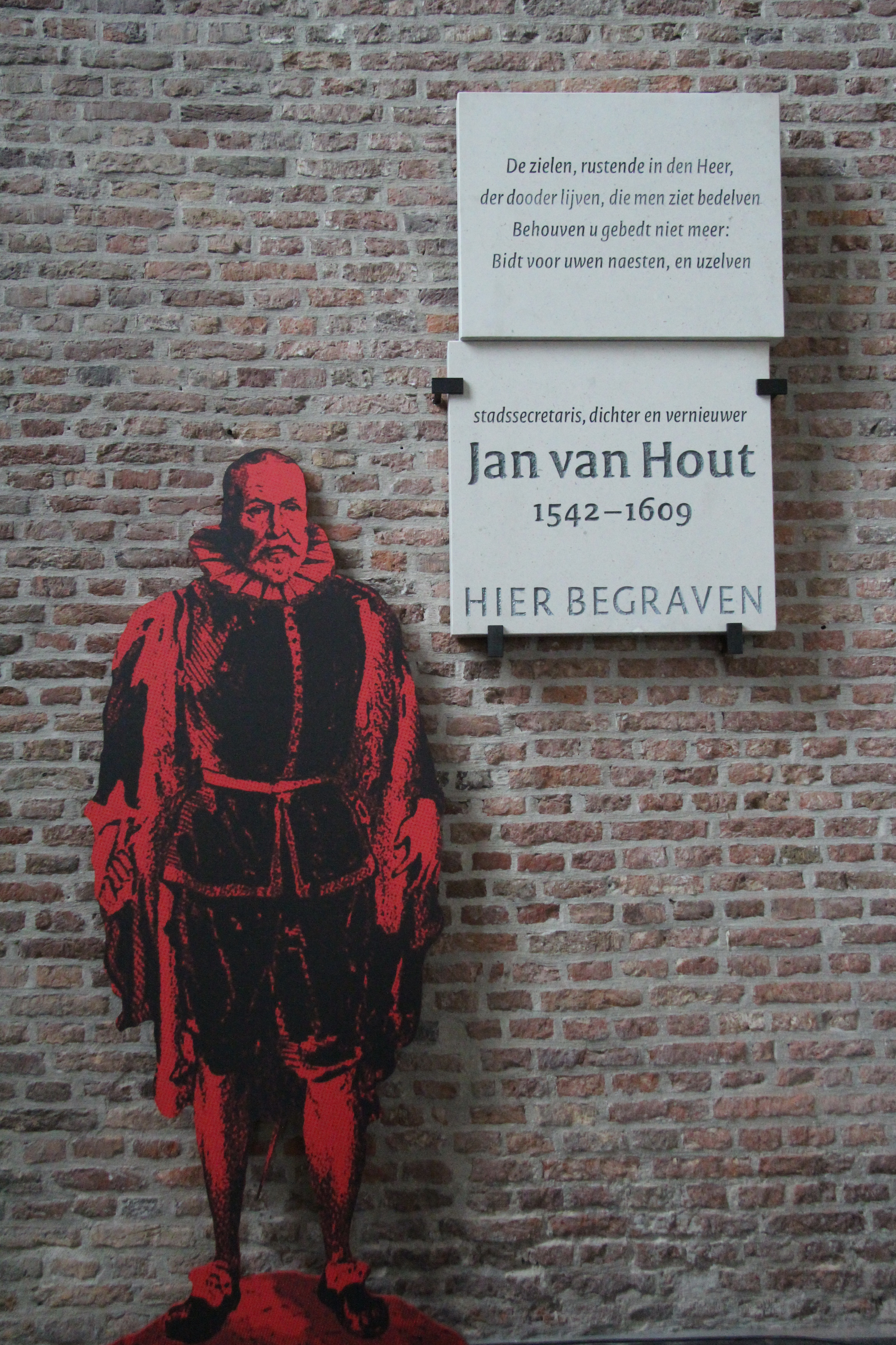 Gedenkteken voor Jan van Hout in de Pieterskerk te Leiden. Onthuld in 2013.